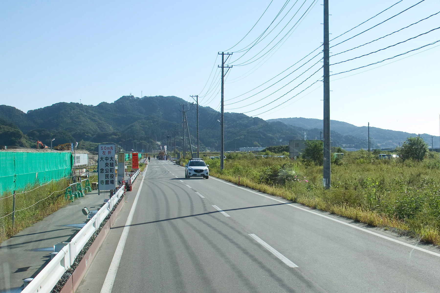 2015年9月当時の大槌駅周辺(線路跡が道路になっている)